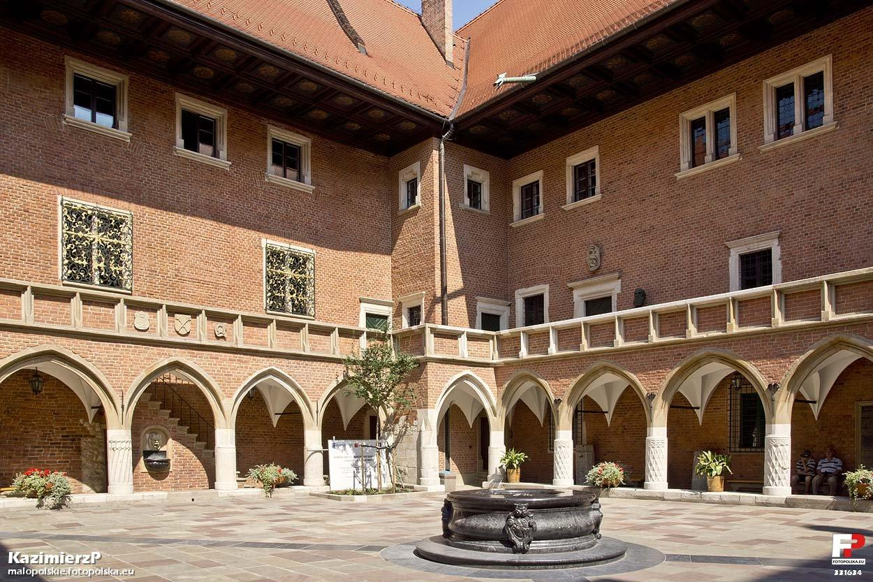 Strona zachodnio północna dziedzińca.